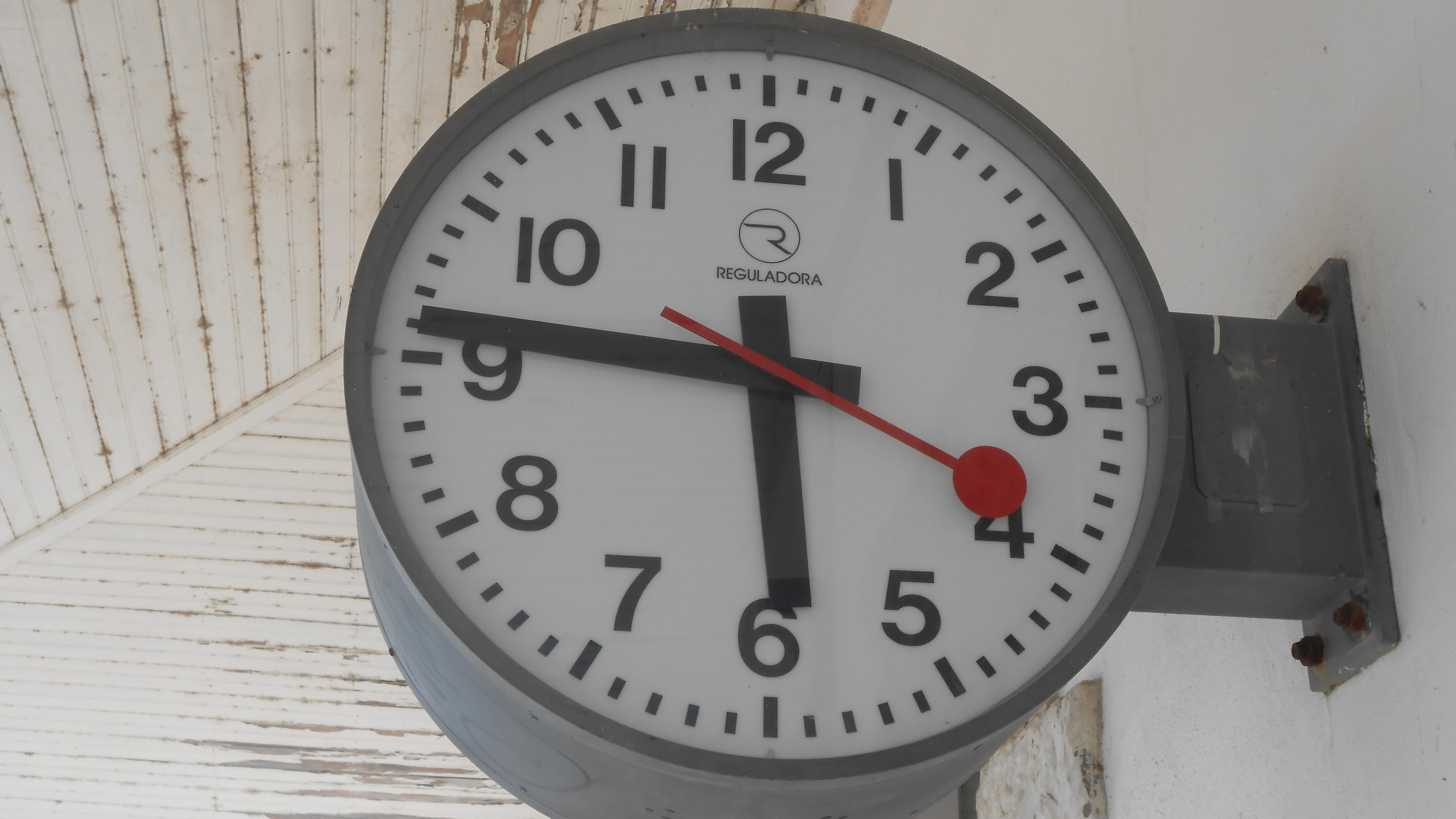 Uhr der Firma Reguladora am Bahnsteig des Bahnhofs Fontela der Strecke "Linha do Oeste" (nahe Figueira da Foz).